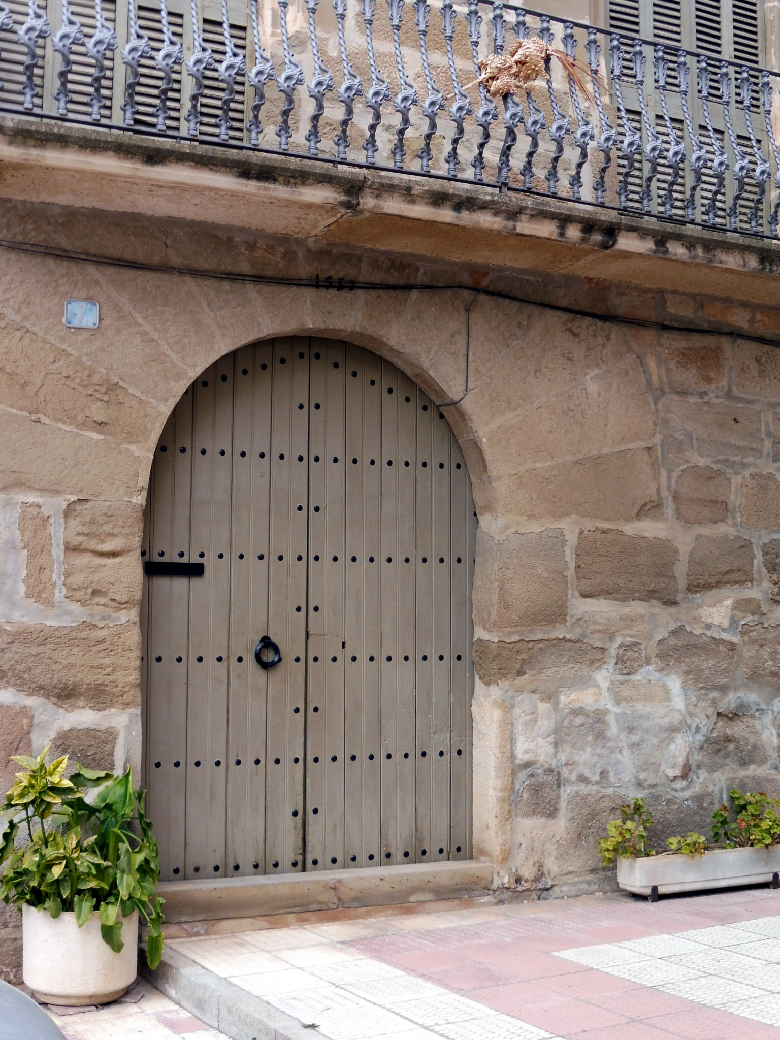 Cal Batalla de Boldú (la Fuliola): portal